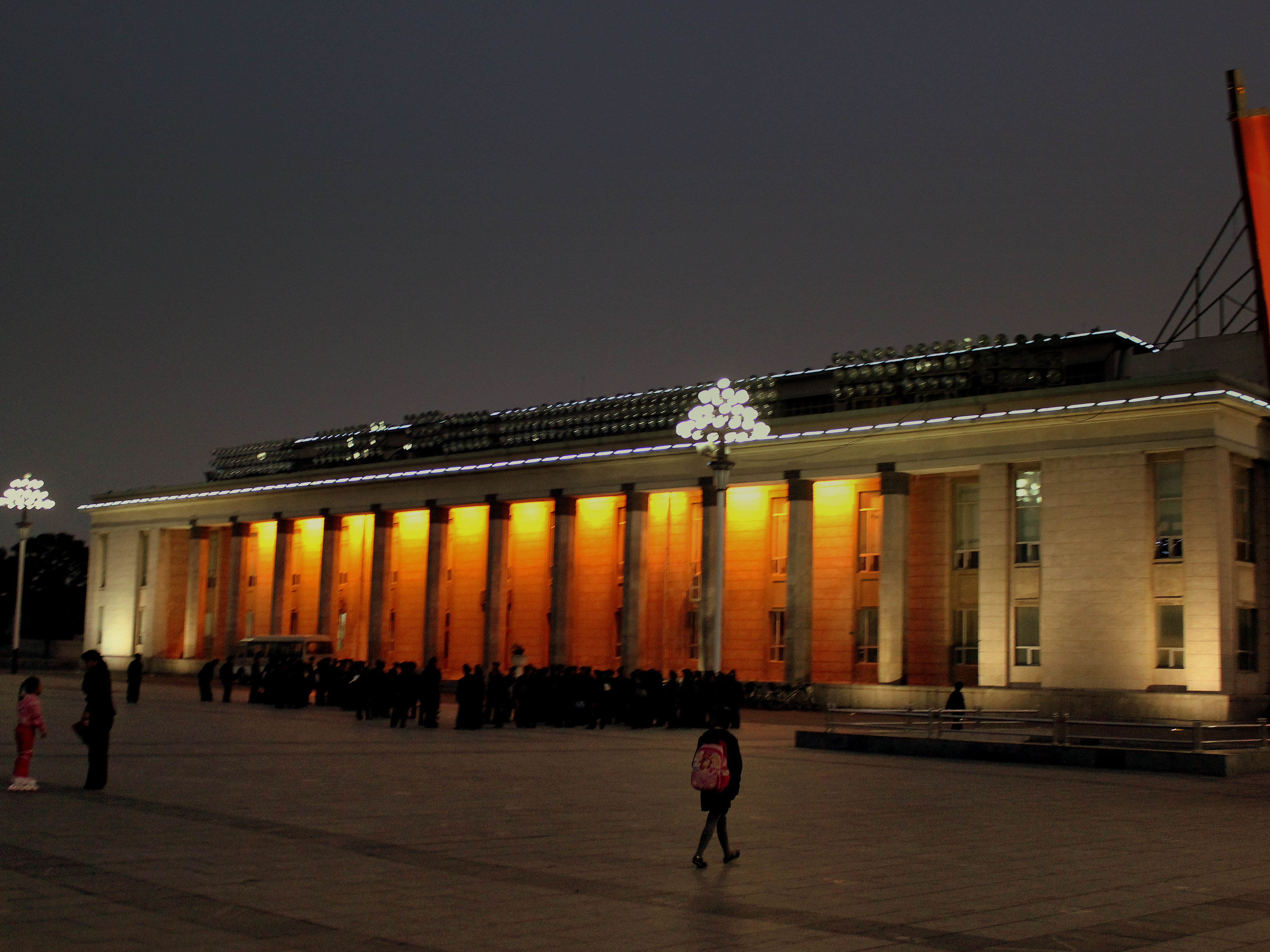 PYONGYANG CITY KIM IL SUNG SQUARE DPR KOREA OCT 2012